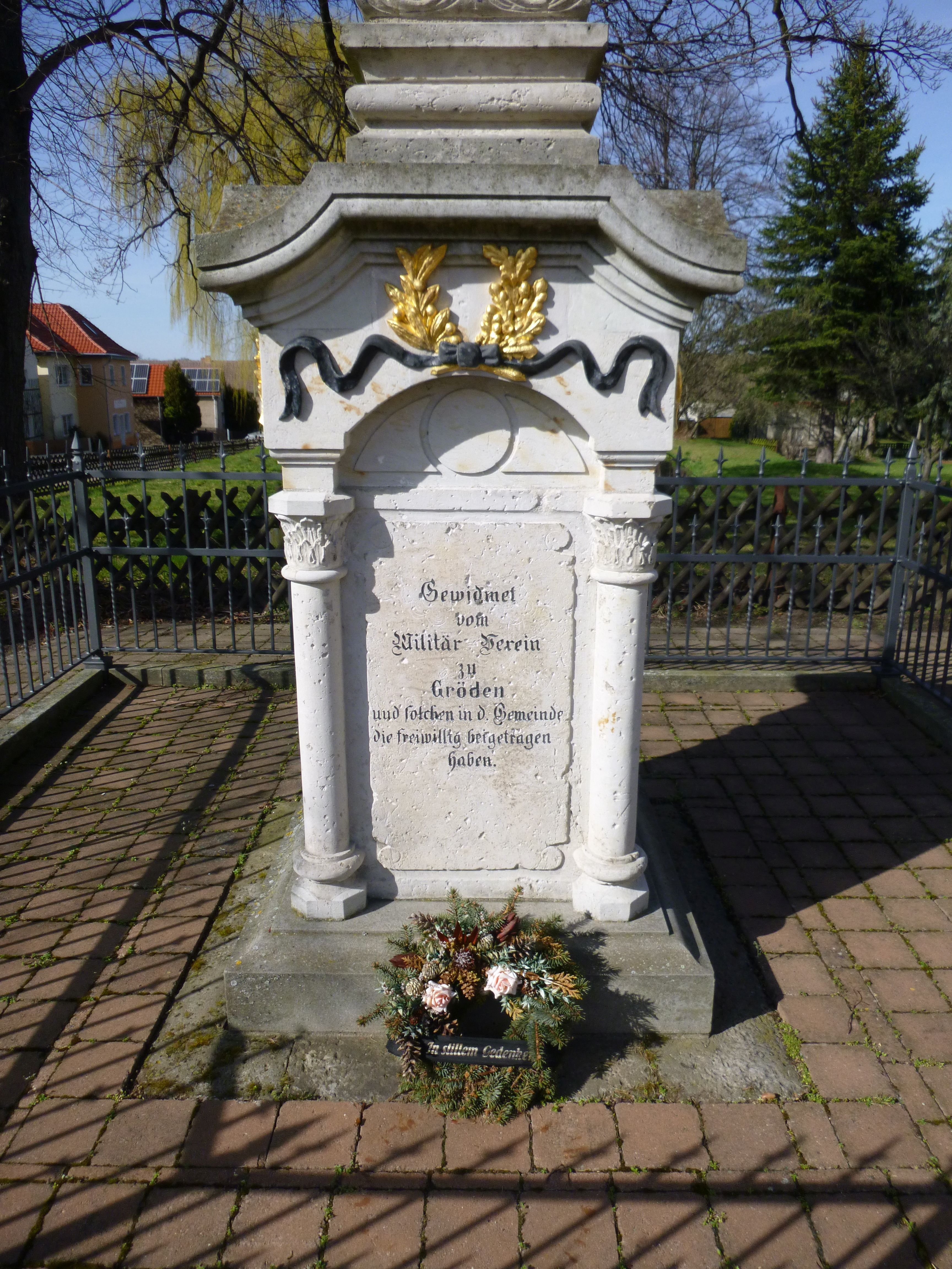 Kriegerdenkmal Gröden